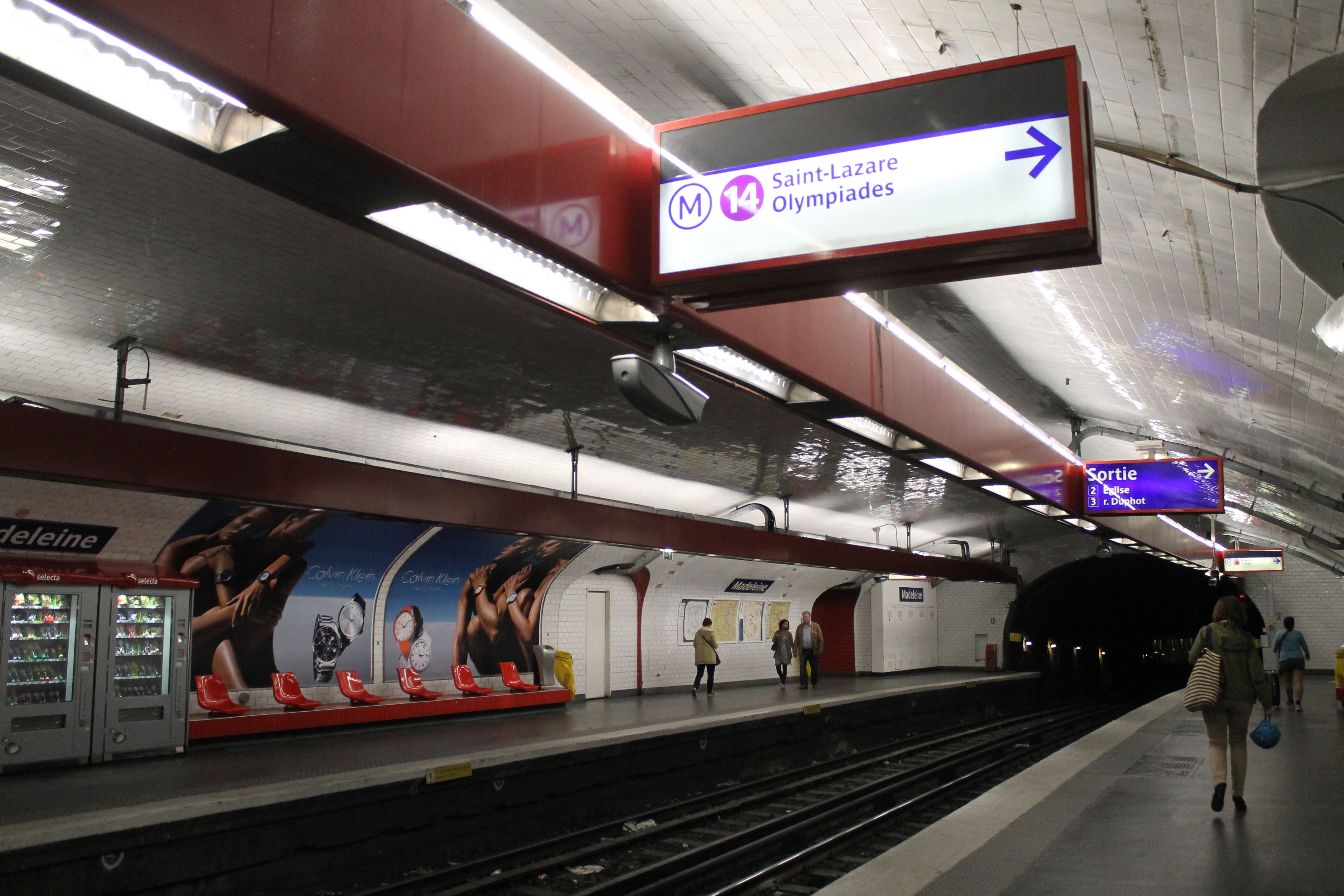 Madeleine Metro station, Paris.